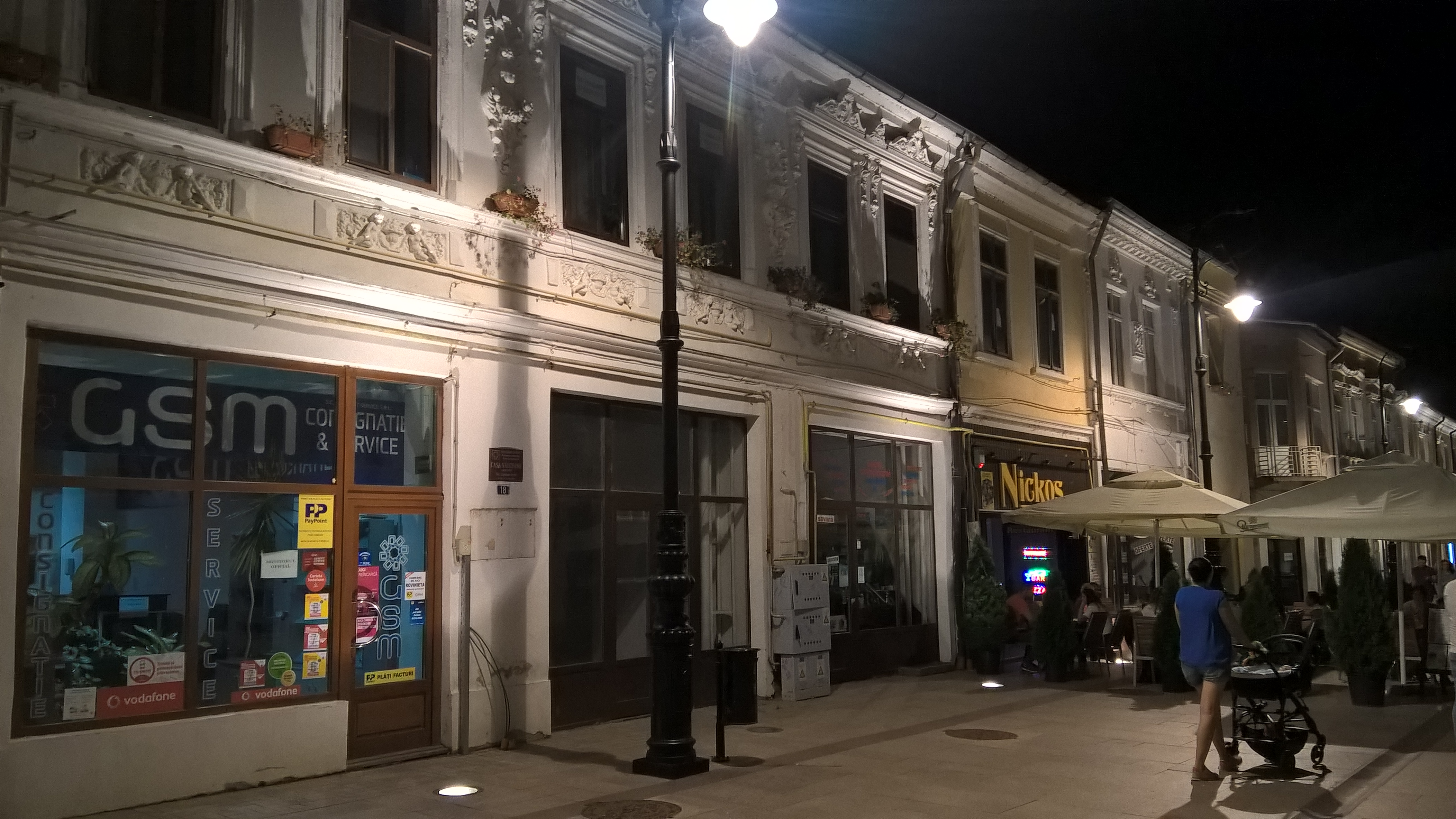 Casa Vâlceanu